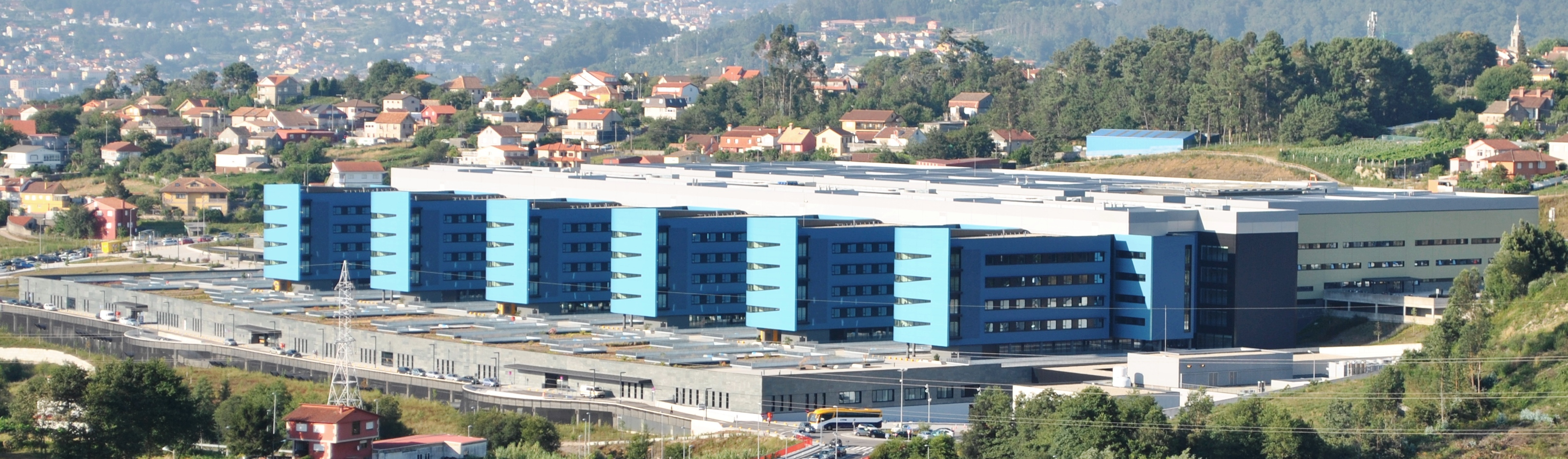 Véxase o título e as categorías